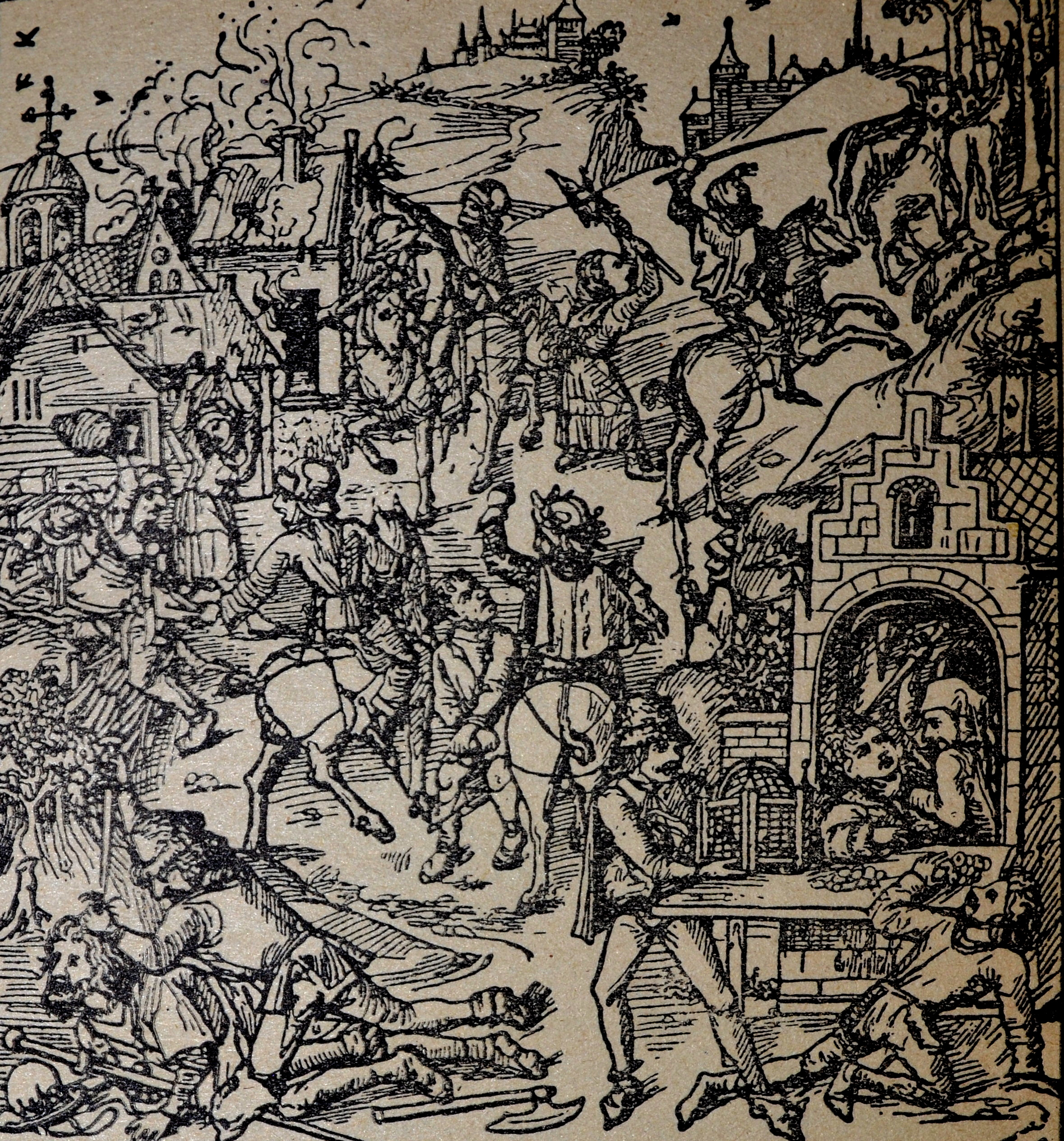 Napad vitezov na kmete, lesorez iz knjige A. Bartels: Der Bauer, objavljen v knjigi Bratka Krefta Velika puntarija kot ilustracija k 3. dejanju.